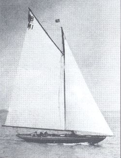 Tramontána sloop vitorlázattal.